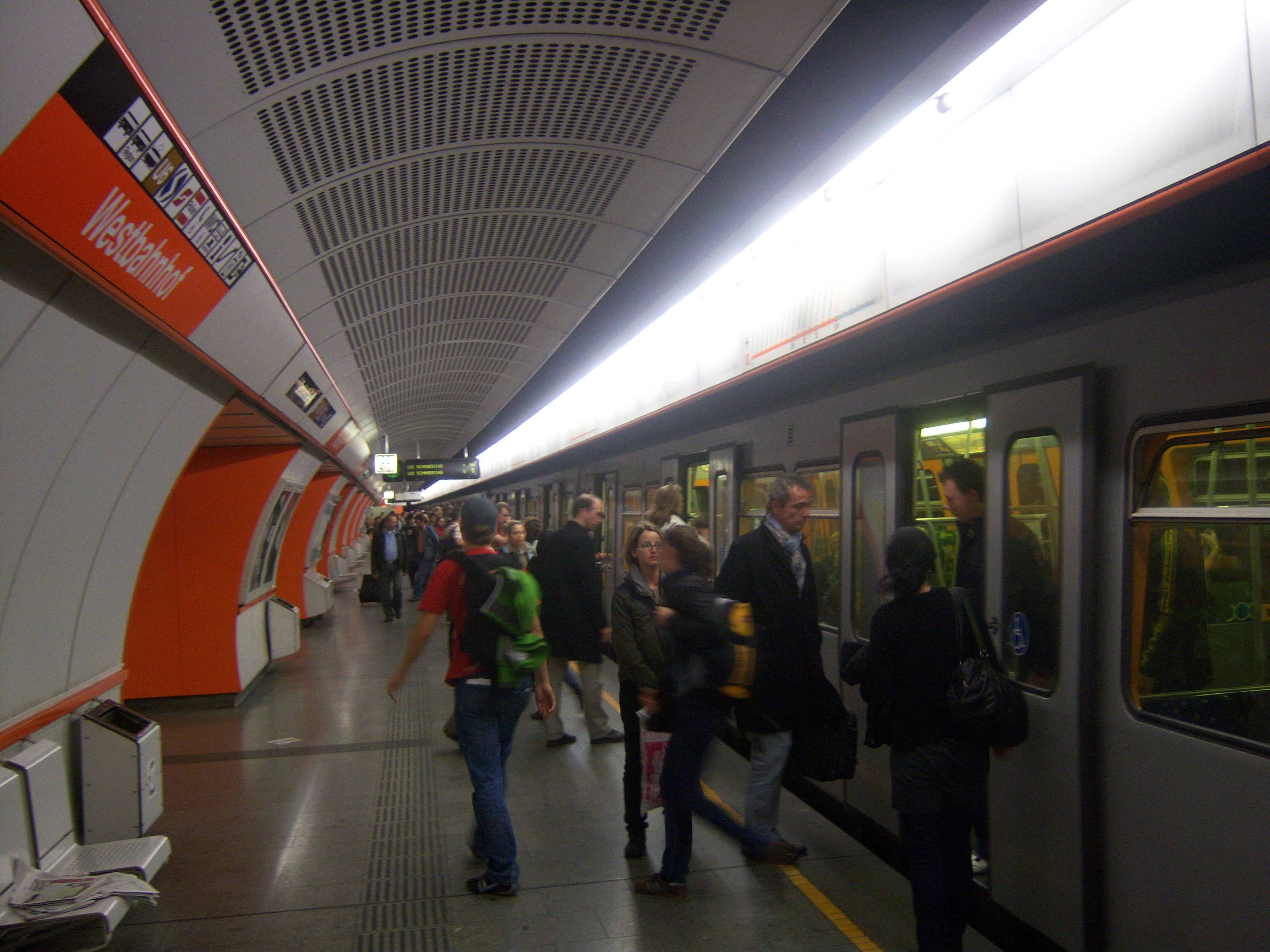 U3-Station Westbahnhof